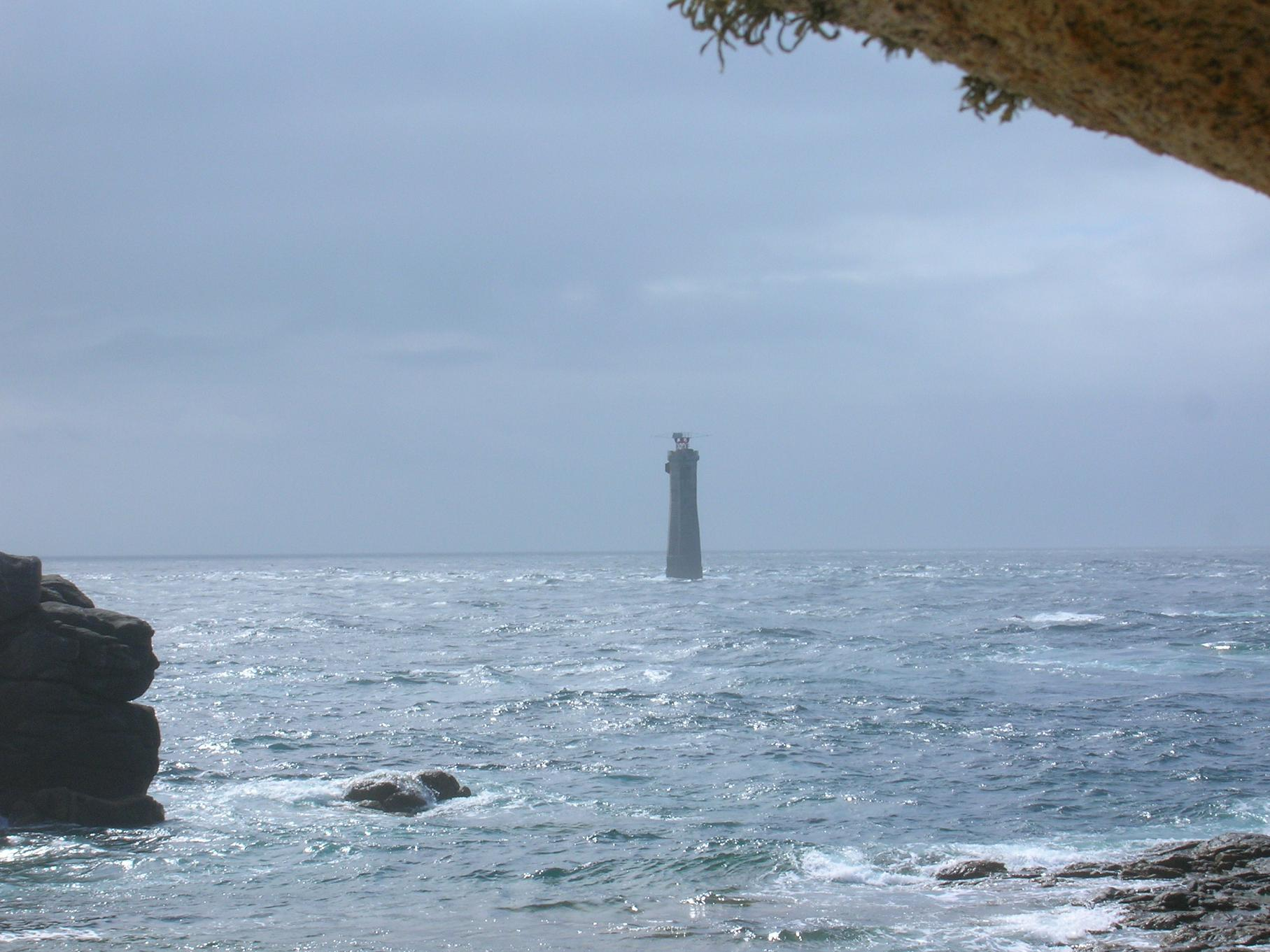 Ouessant, France - Phare du Nividic